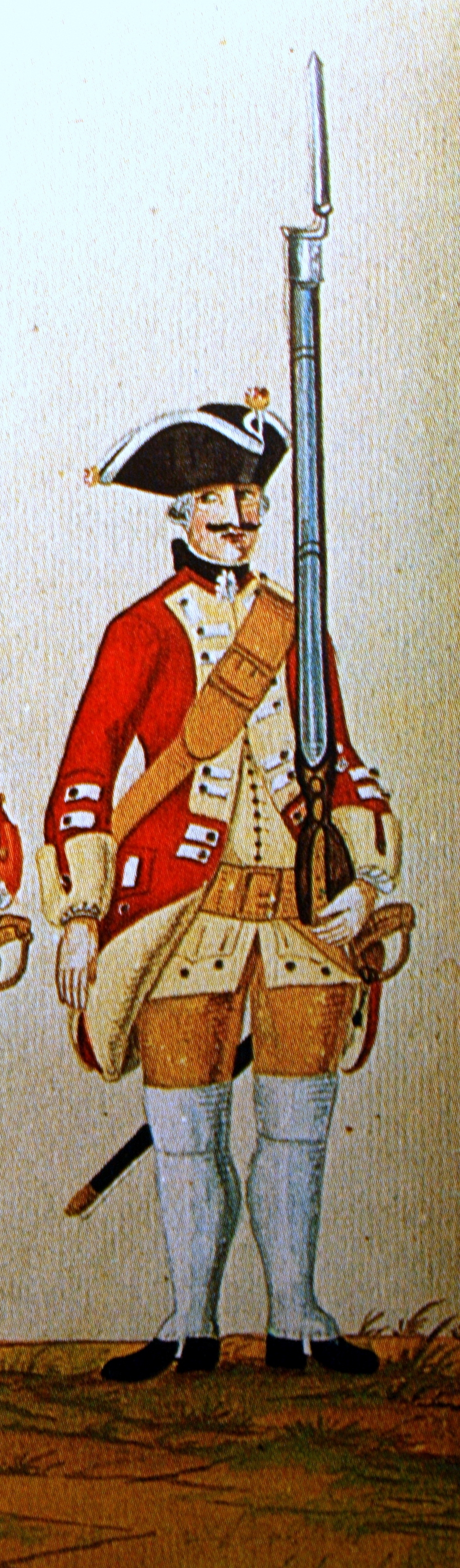 Infanterieregiment No. 2 B der kurhannoverschen Armee während des Siebenjährigen Krieges.